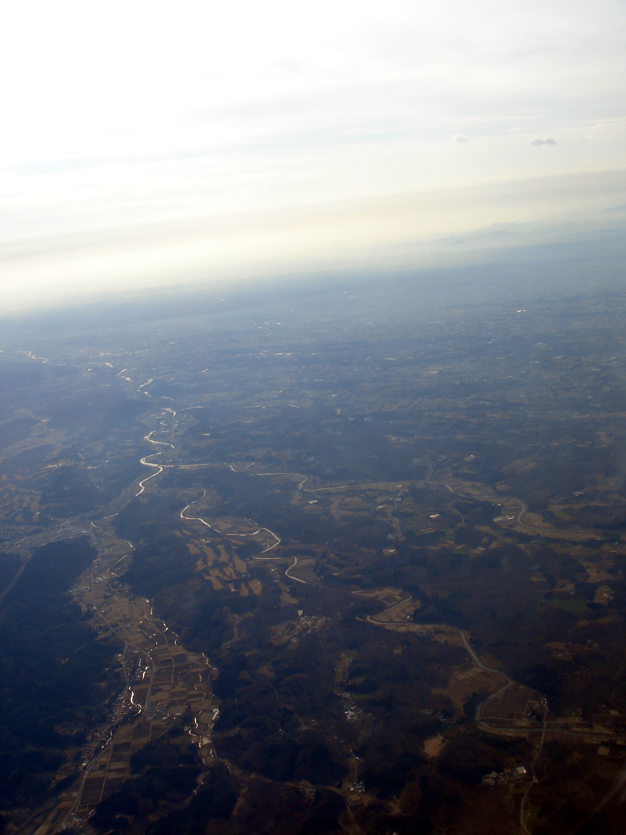 Vue de le rivière Naka et du Nasunogahara.